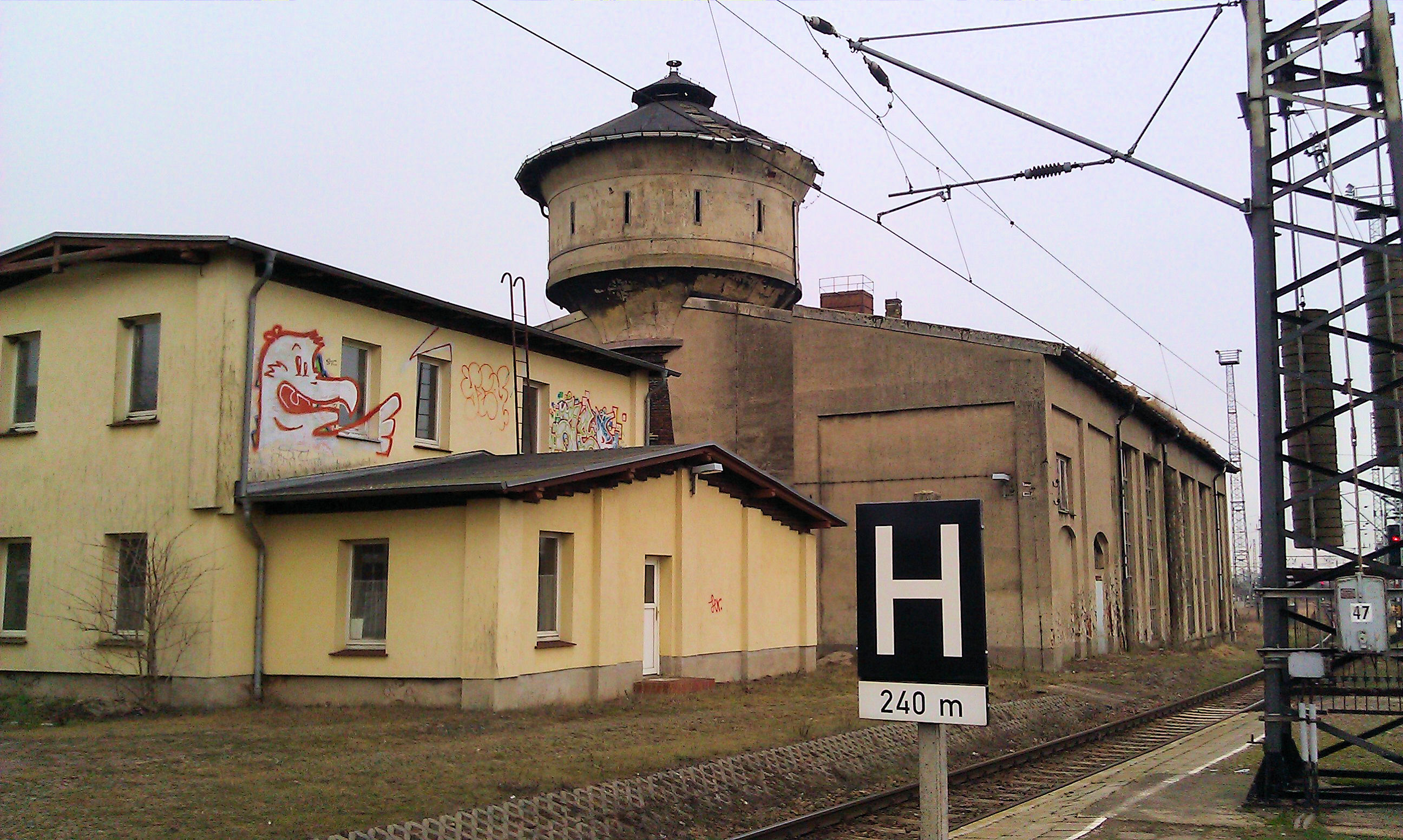 Bahnhof Bad Kleinen, Mecklenburg-Vorpommern